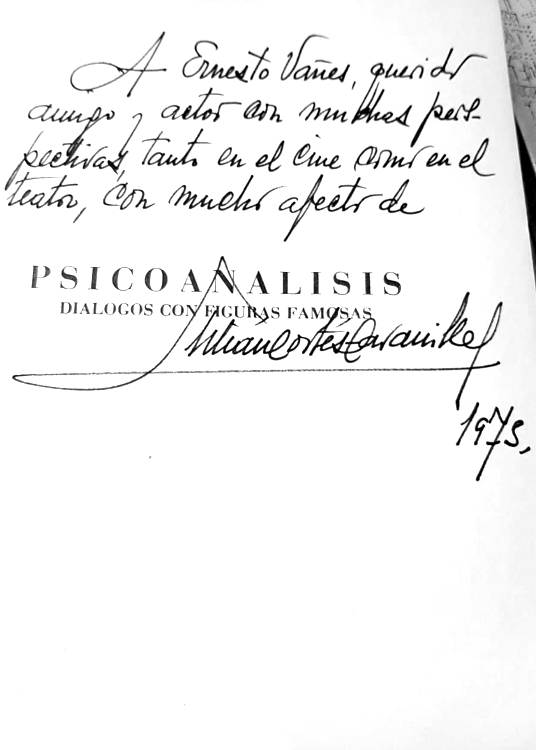 Julián Cortés-Cavanillas. Psicoanálisis. Diálogos con figuras famosas (1967). Madrid. Prensa Española